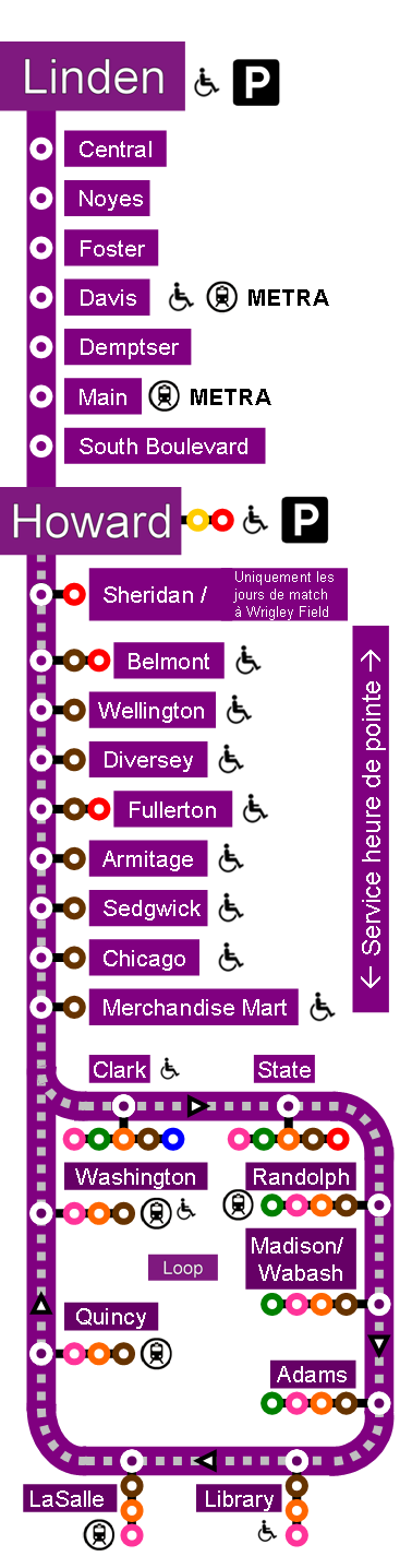 Plan de la ligne mauve fait moi-même